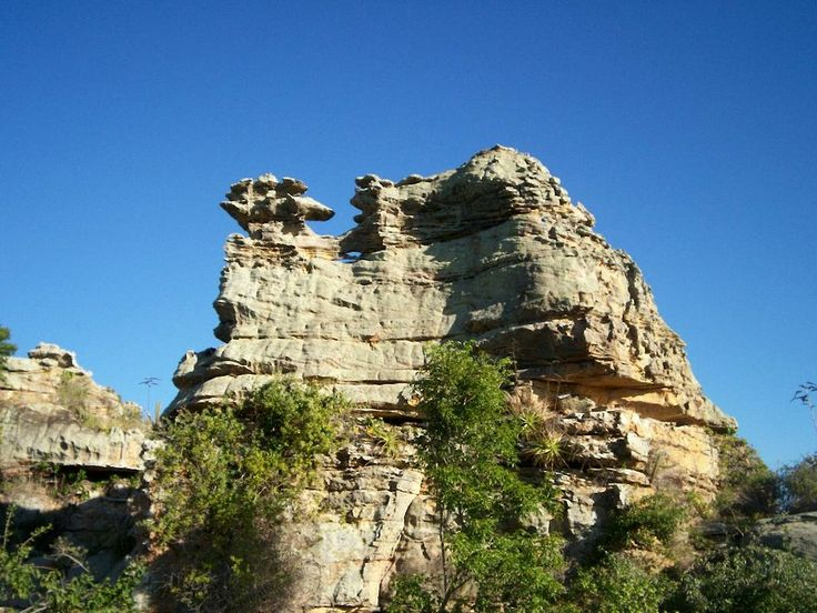 cartal postal